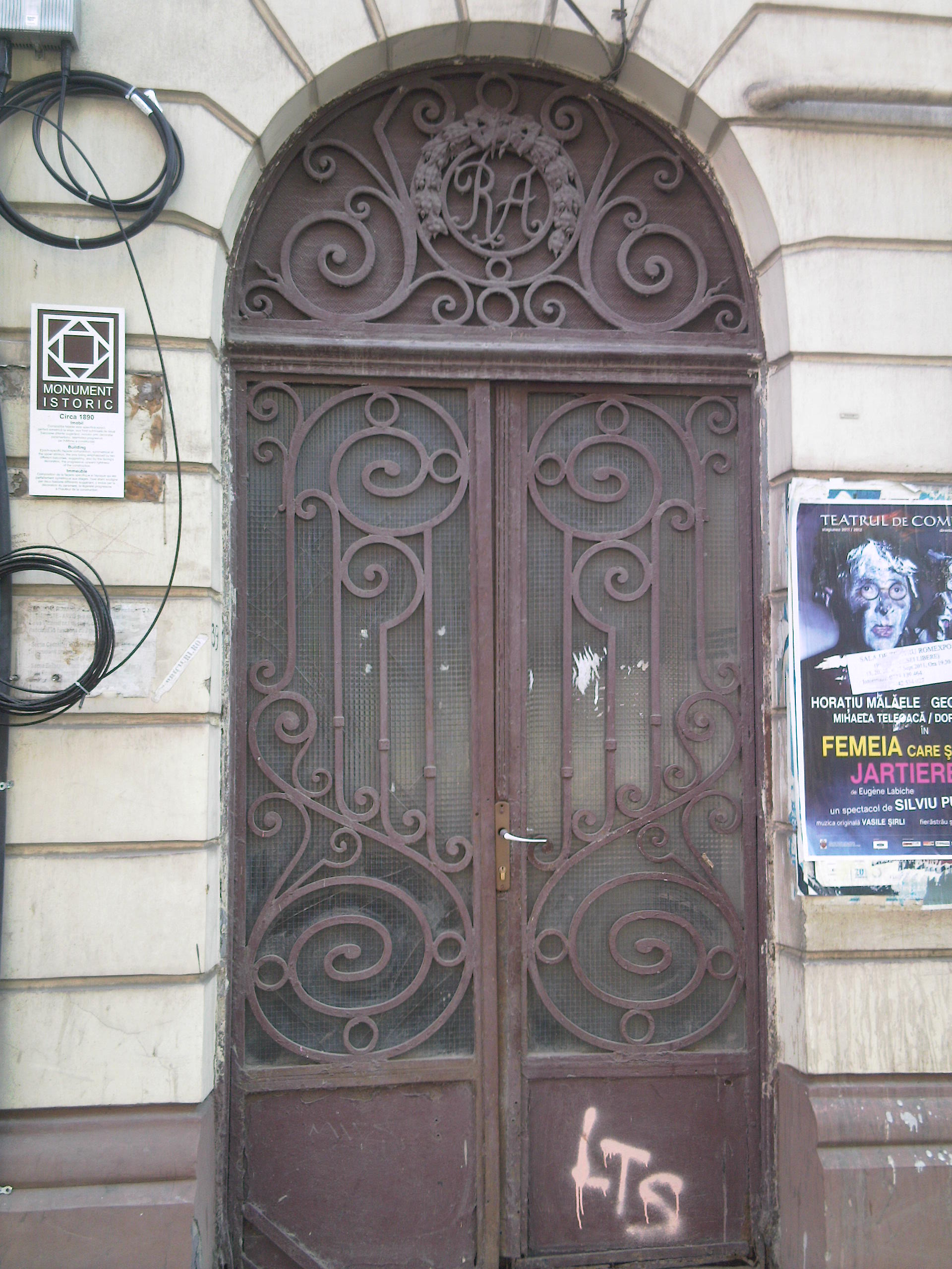 Ușa unui imobil din 1890, Bd. Regina Elisabeta nr 39, București